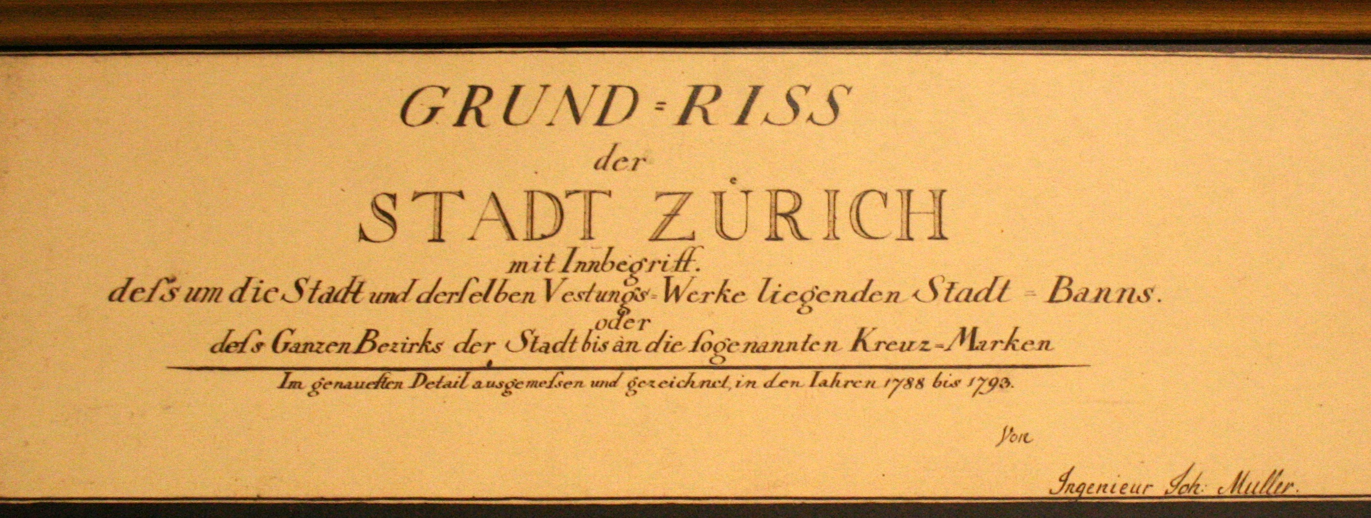 Überschrift über dem Müllerplan von 1793